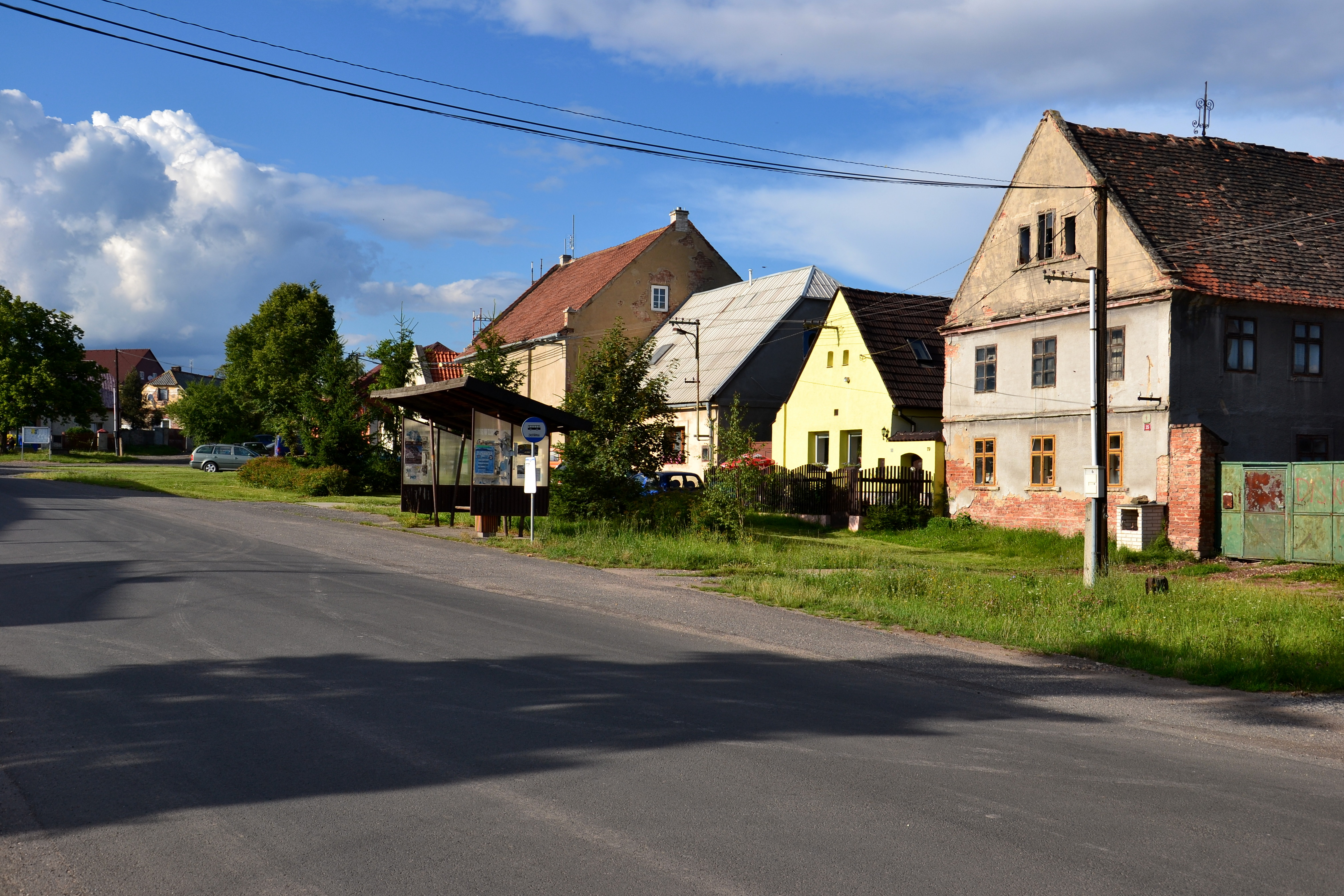 Náves v Přečaplech